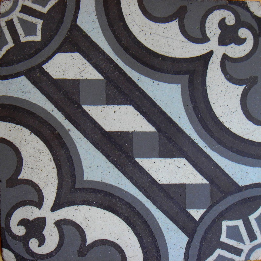 Carreau de grès cérame coloré dans l'épaisseur, Manufacture Paul Charnoz, Paray le Monial, France, XIXe siècle. (Photo:Nathalie Charpiat)